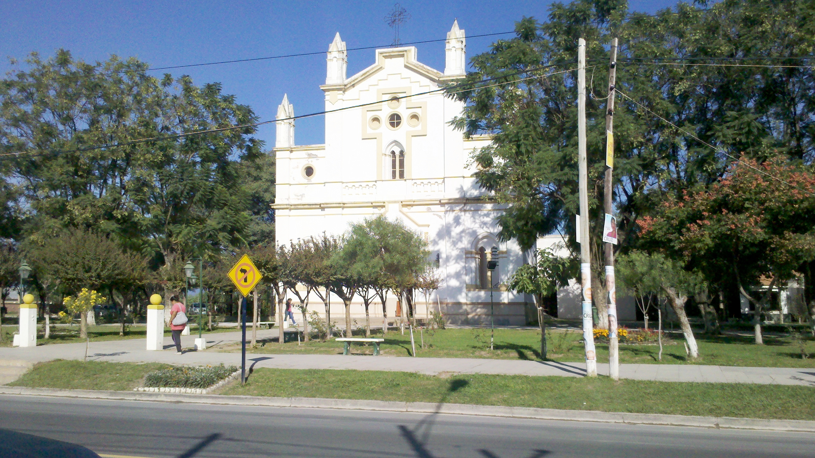 Iglesia de La Merced - Departamento de Cerrillos